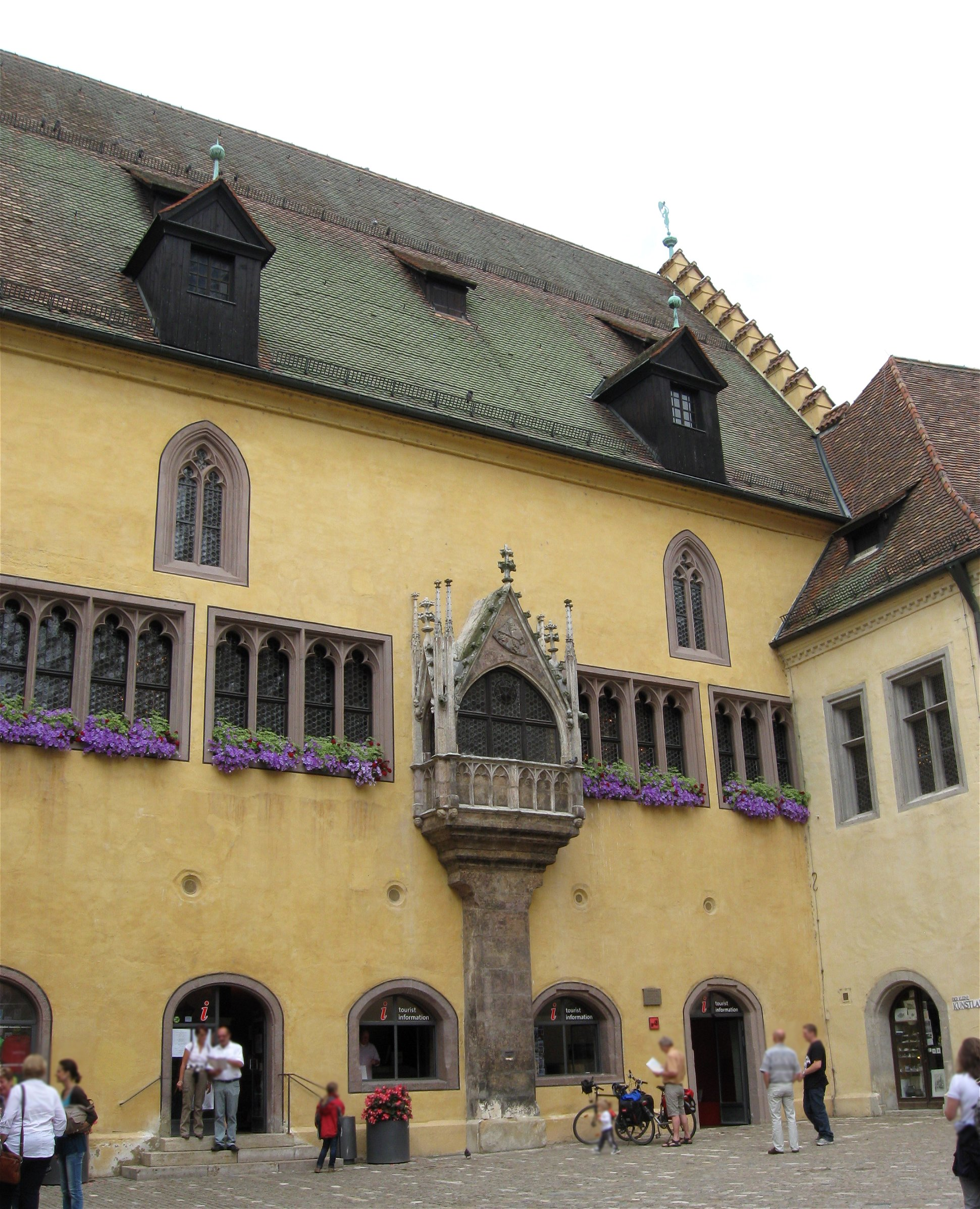 Rathausplatz 1; Rathausplatz 4; Roter Herzfleck 2. Altes Rathaus, mehrteiliger Baukomplex; Reichssaalbau, zweigeschossiger und traufständiger Satteldachbau mit Standerker und Treppengiebel, Fassadengliederungen in Kalkstein, gotisch, 2. Viertel des 14. Jh., mit romanischen Bauteilen; Rathausturm, neungeschossiger Turmbau mit Pryamidendach mit Laterne, Tordurchfahrt, vermauerter Laube und Maßwerfenstern, westlich viergeschossiger Walmdachbau, Mitte 13. Jh. mit spätgotischen Veränderungen, Turm Anfang 18. Jh. umgebaut; Rückgebäude, zweiteiliger Komplex mit zwei- und dreigeschossigen Walmdachbauten, spätgotisch, Umbauten 1562, nach Südosten Hauptportal mit Treppenaufgang, gotisch, 1408; Stadtschreiberhaus und Fürstenkollegium, zweigeschossiger und traufständiger Satteldachbau, im Kern mittelalterlich, Umbauten 1652